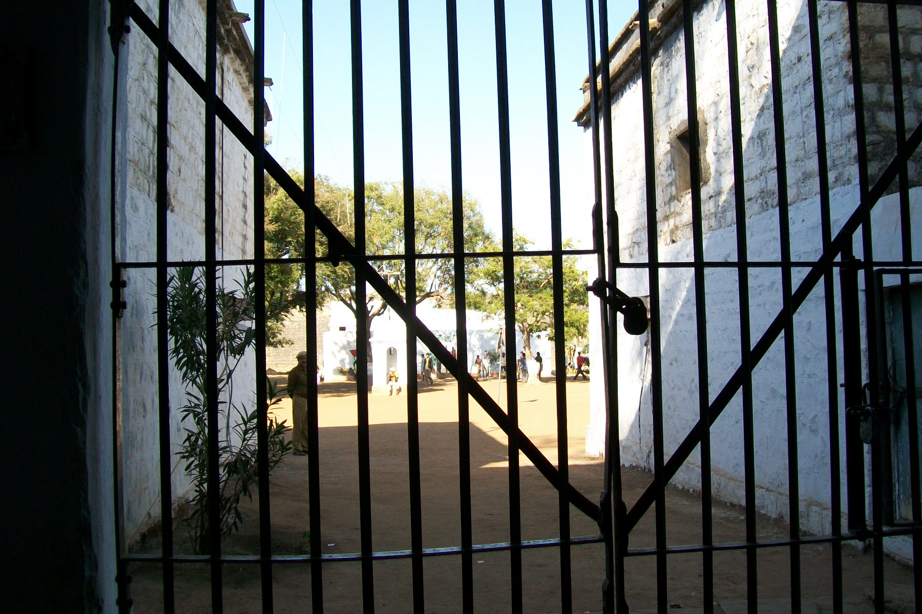 जिला कारागार,प्रतापगढ़ का दृश्य